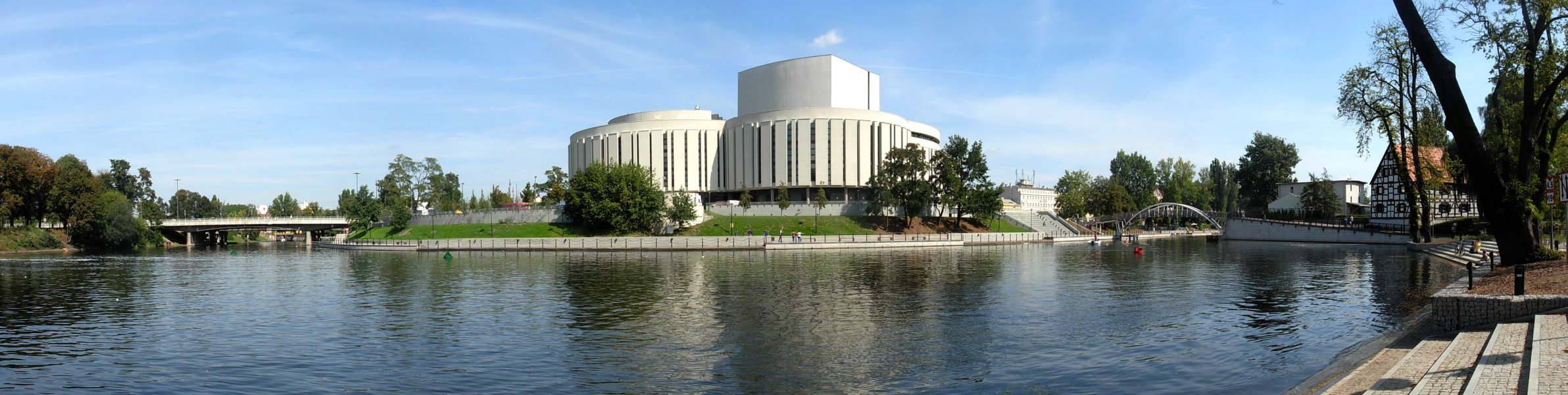 Widok z Wyspy Młyńskiej na zakole Brdy w Bydgoszczy